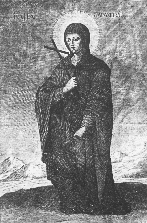 Οσία Παρασκευή η Επιβατινή